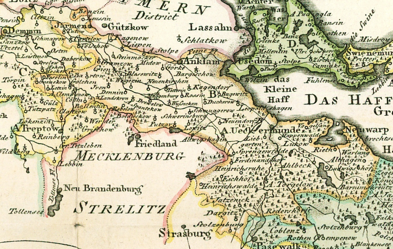 Ausschnitt aus "Landkarte des Herzogtums Vor- und Hinterpommern aus dem Jahr 1794"